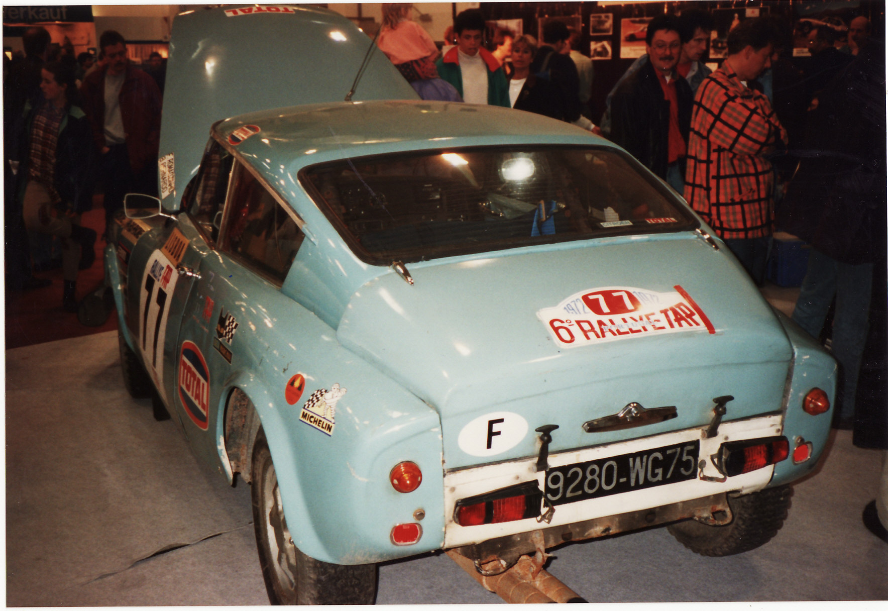 At Techno Classica Essen 1994